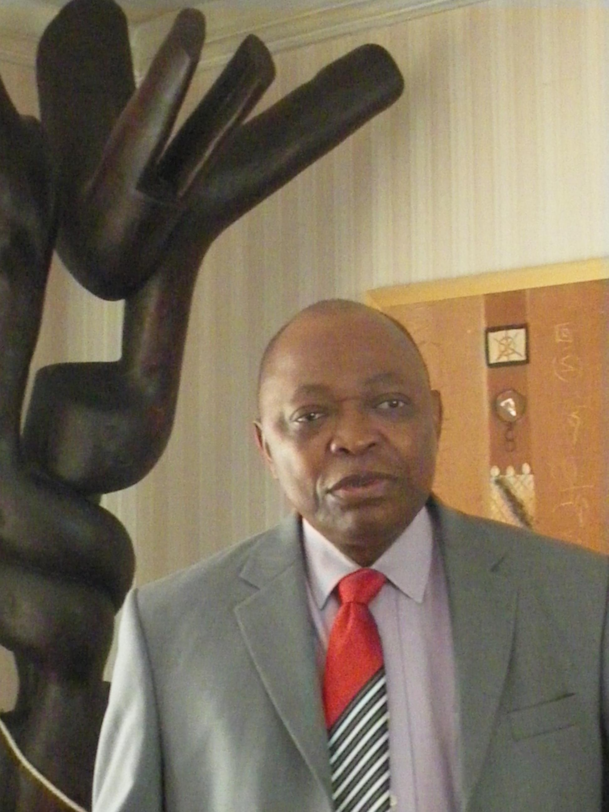 Noureini TIDJANI-SERPOS, sous-directeur général de l'UNESCO chargé du Département Afrique